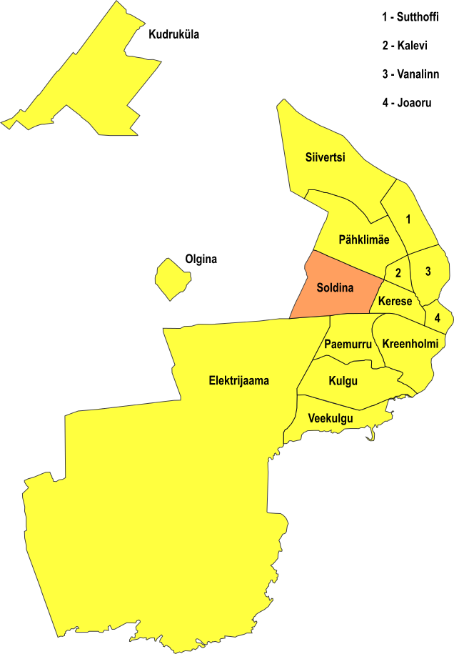 Narva linnaosa Soldina